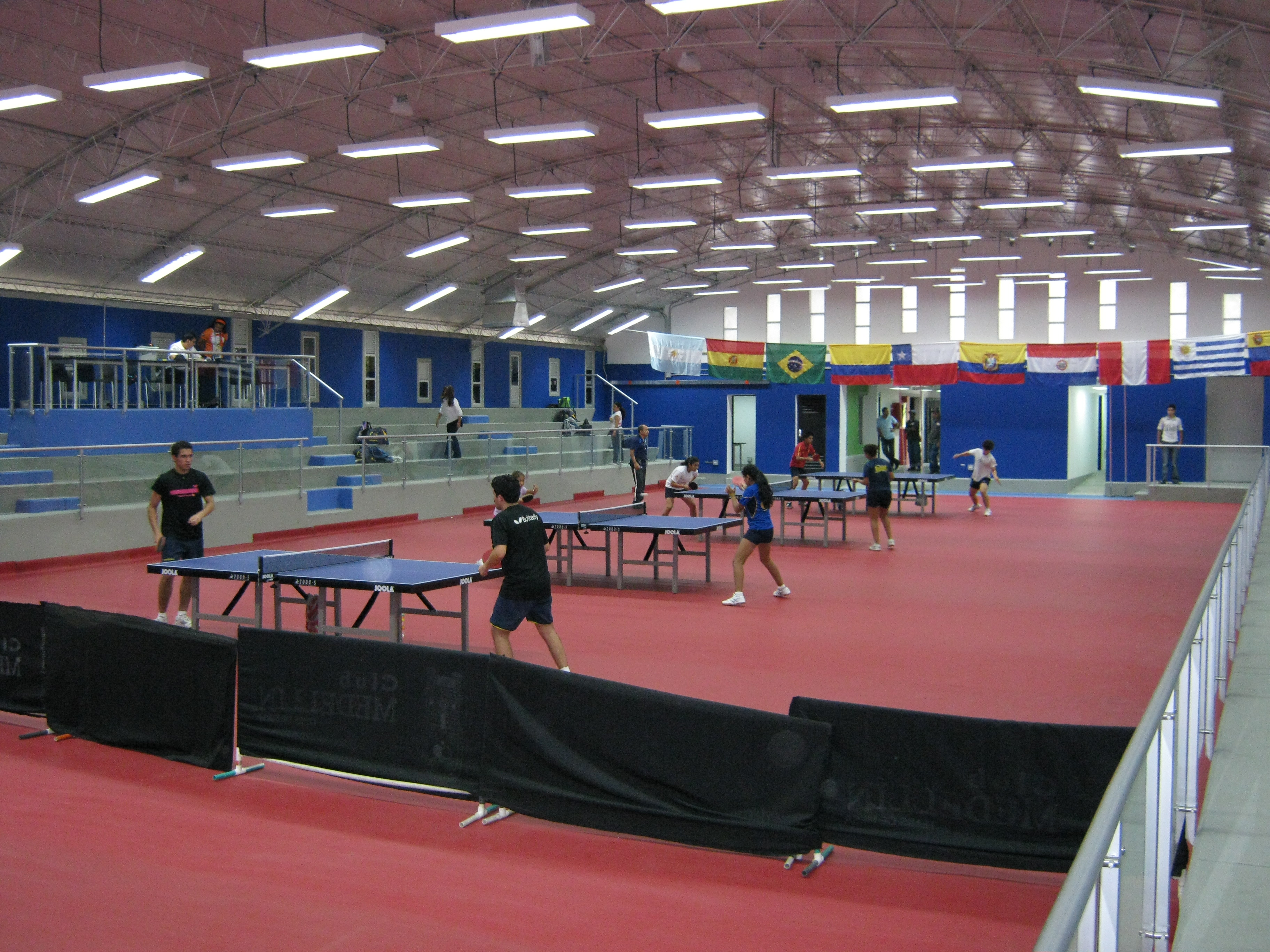 Interior del Coliseo de Tenis de Mesa, en la Unidad Deportiva Atanasio Girardot. Medellín. Colombia.